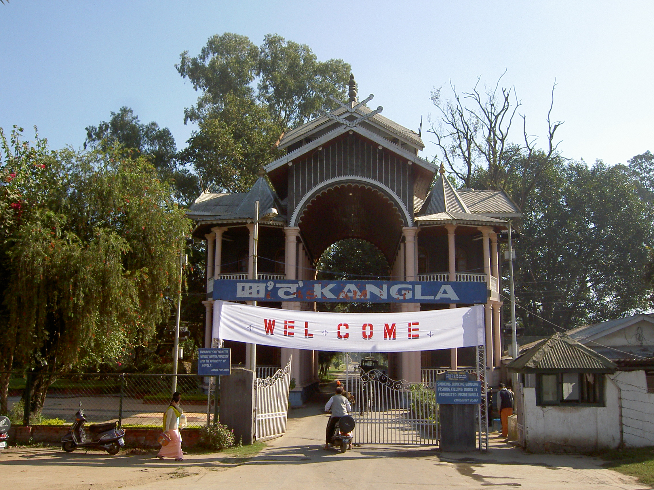 Kangla Gate Today